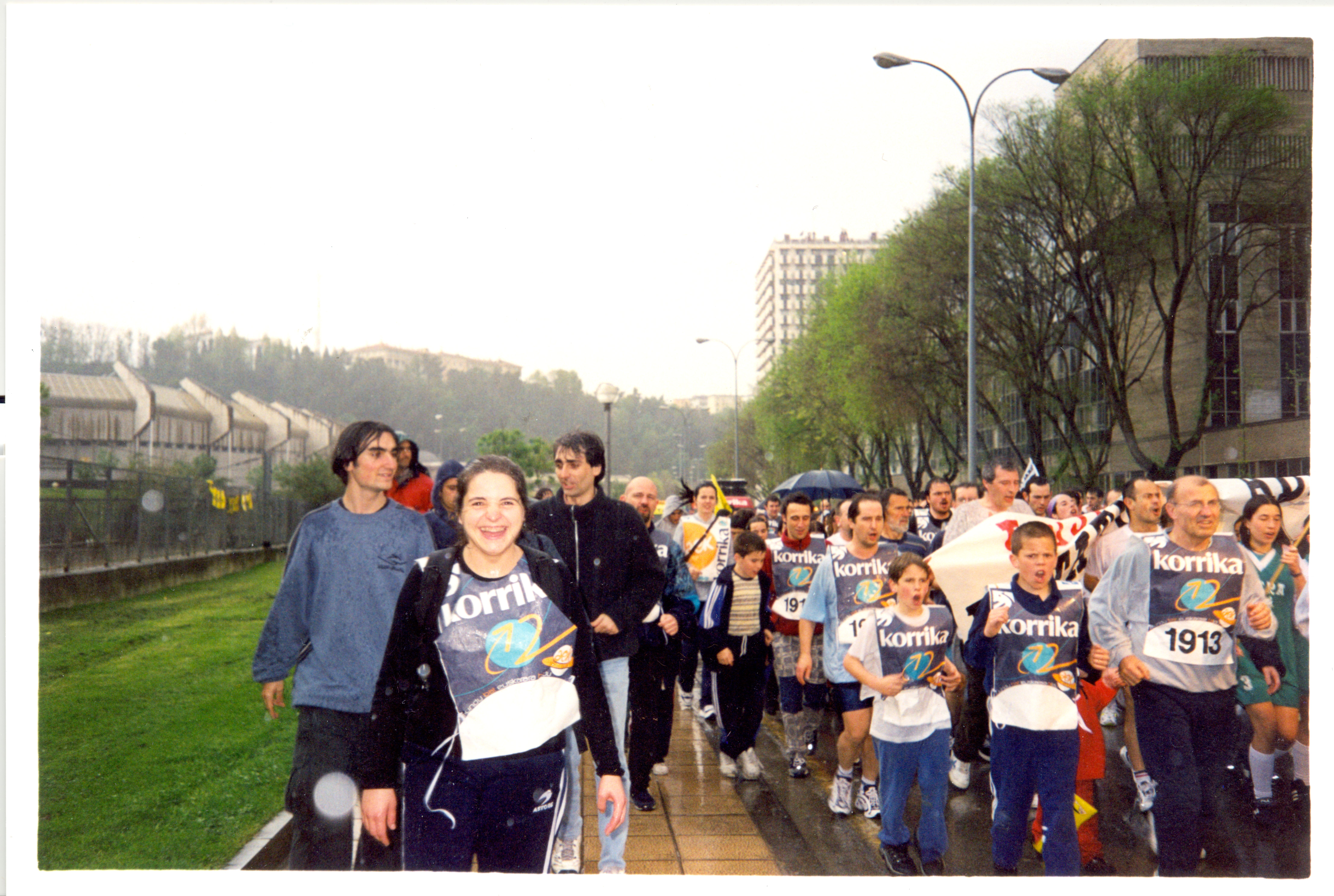 Korrika 12. Zorroaga kalea zeharkatzen, Karmelo Ikastetxe parean eta atzean Anoeta / La 12a edición de la Korrika a su paso por la calle del Alto de Zorroaga a la altura de El Carmelo, detrás Anoeta. Colección AMARAuna Bilduma 2001 Er. 557 Iturria / Fuente: Mertxe Mardaras Informazio gehiago / Más información: Amarako Ernest Lluch Kultur Etxeko Liburutegia / Biblioteca del Centro Cultural Ernest Lluch de Amara (Donostia / San Sebastián). Korrika, popular relay race in support of the Basque language across Donostia-San Sebastián